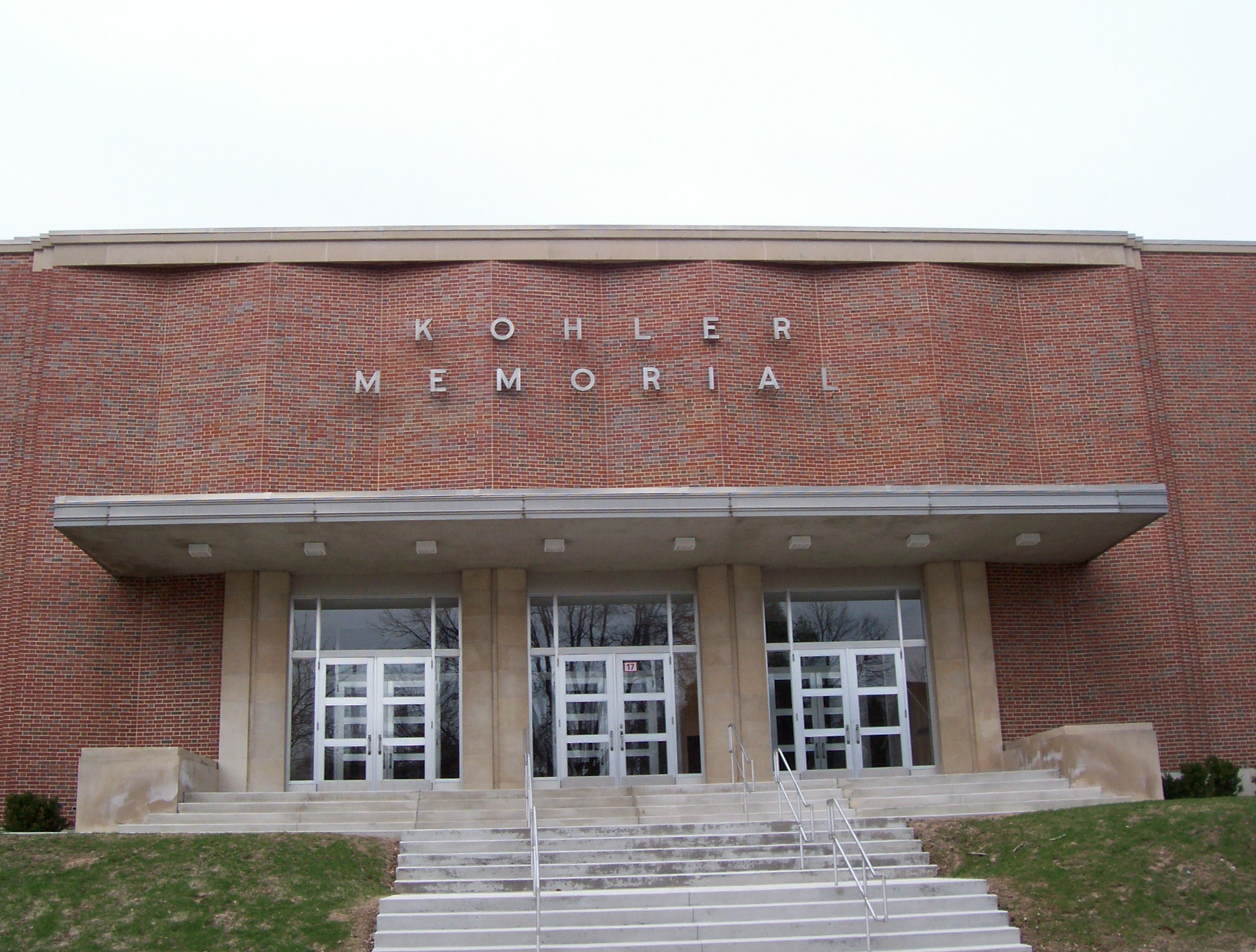 Kohler Memorial High School in Kohler, Wisconsin(USA)